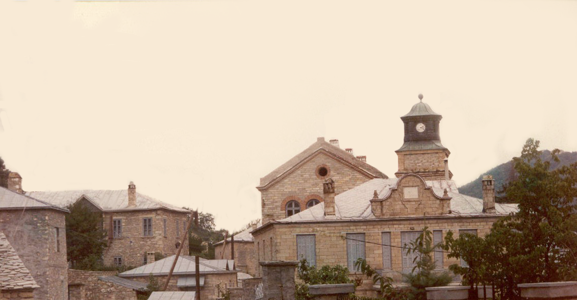 Училището в Невеска (Нимфео), Егейска Македония, Гърция.